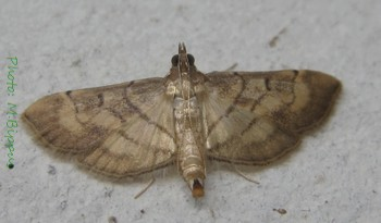 Cnaphalocrocis trebiusalis (16mm wingspan)